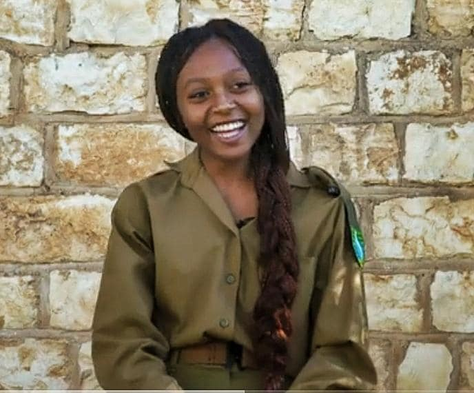 Depicted person: Eden Alene – Israeli female singer